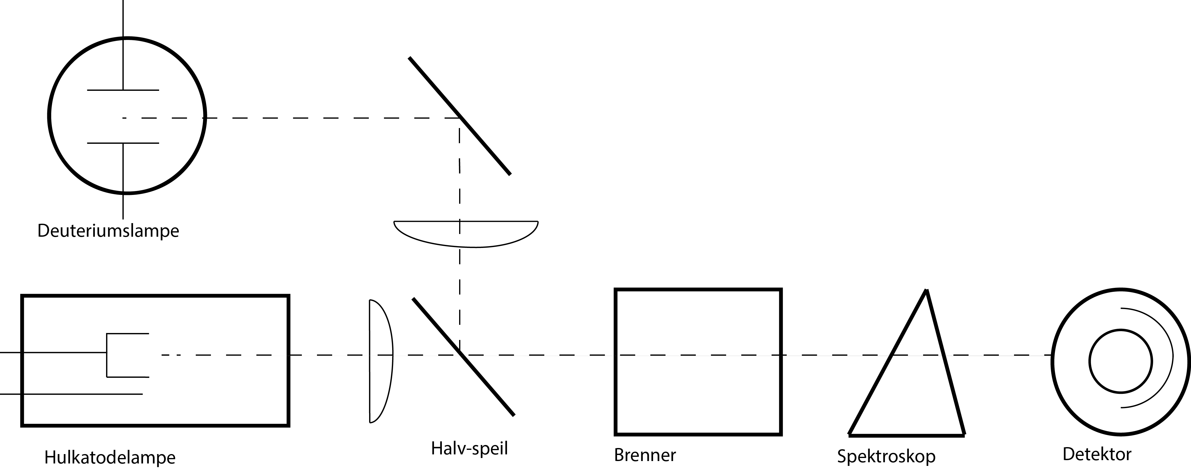 Hvordan en kontinuerliug deuteriumslamp bakgrunnskorrektor er satt opp.